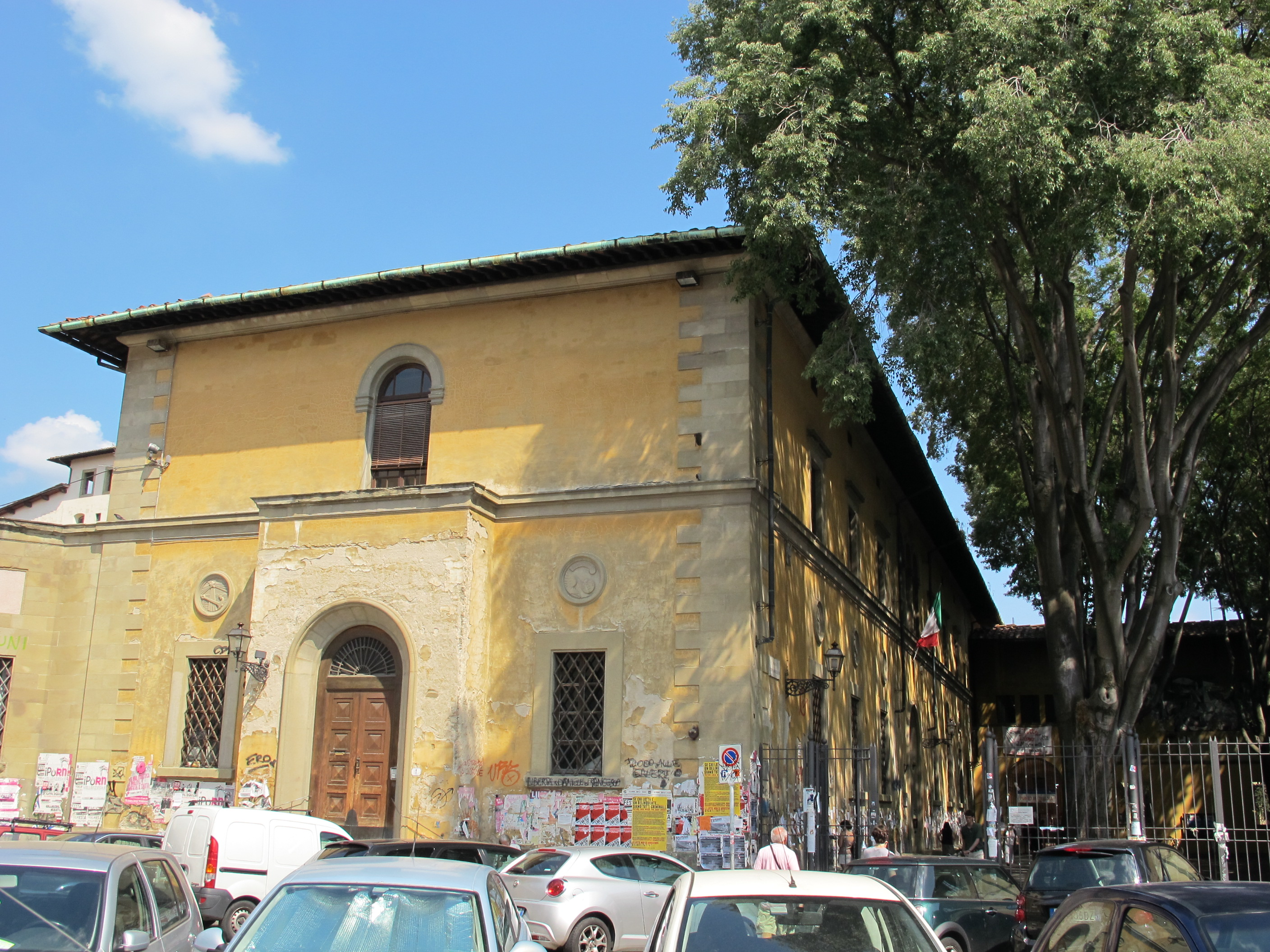 Casa del mutilato, veduta